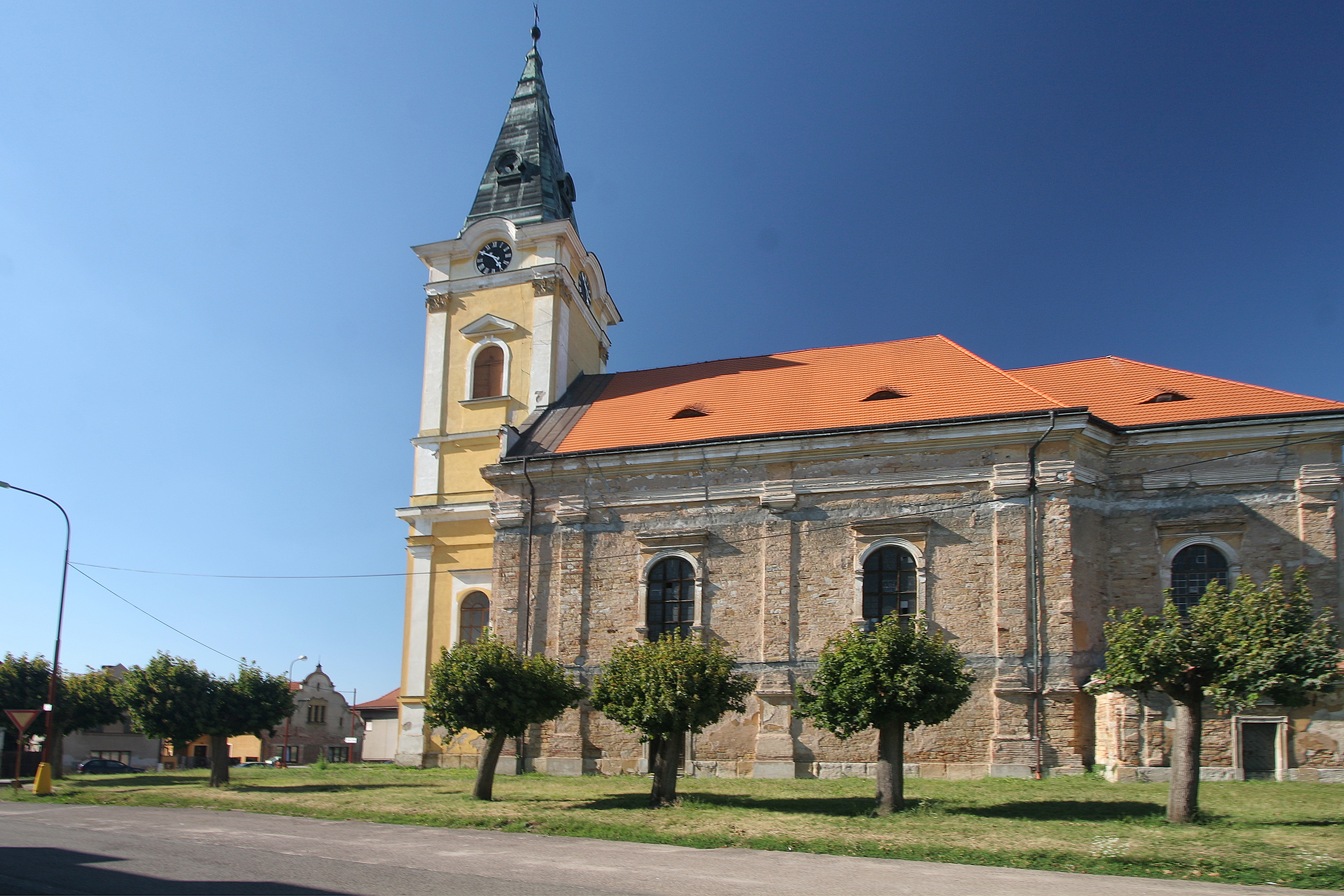 Smidary kostel sv. Stanislava